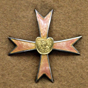 Odznaka 13 puł